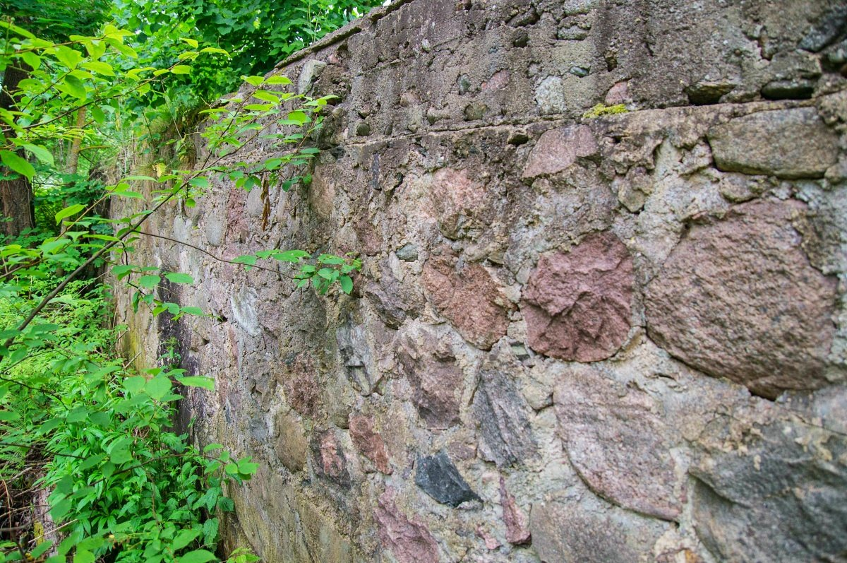 Іжа. Млын